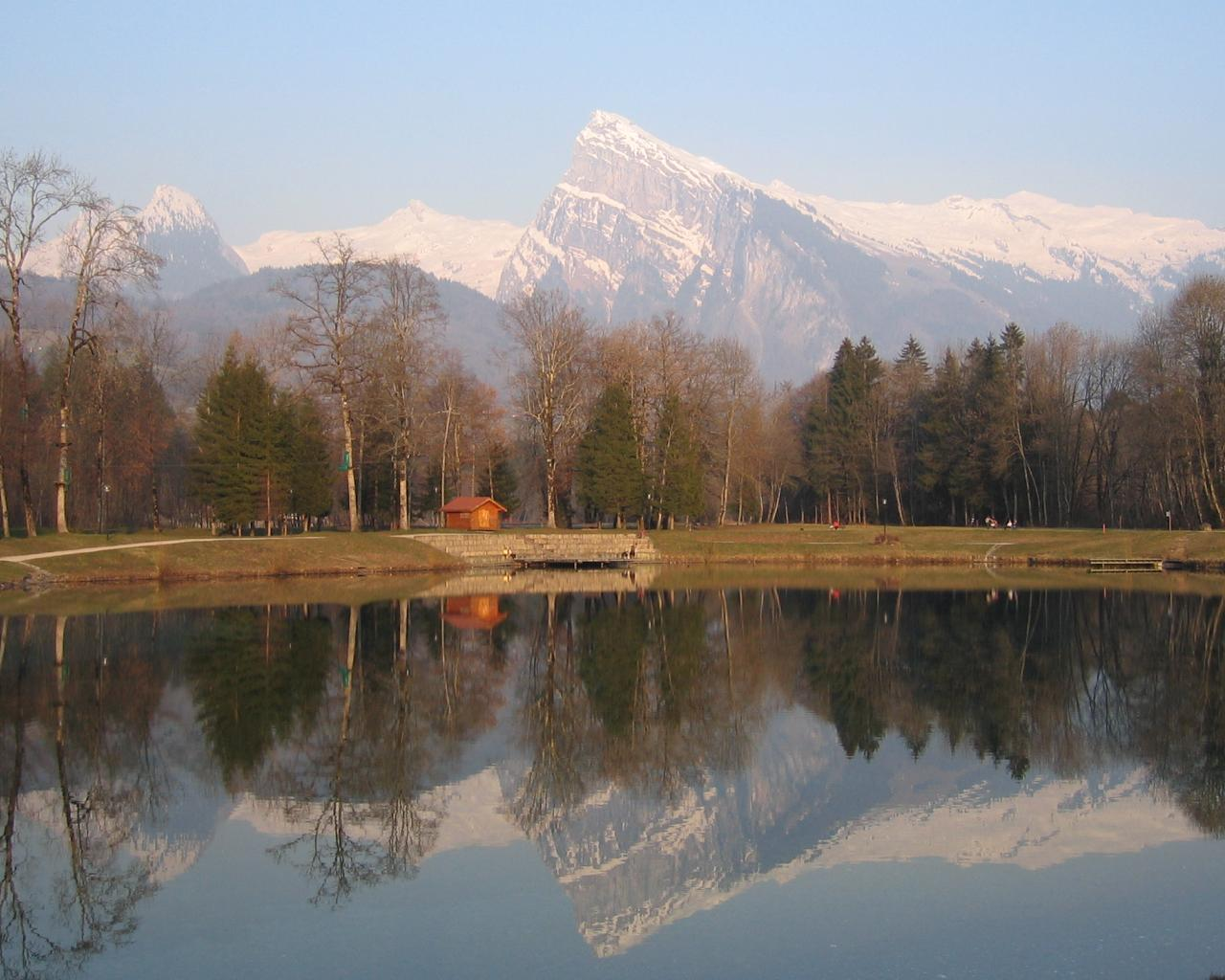 Le "Lac Bleu" situé sur la commune de Morillon en Haute-Savoie (74). En arrière plan, la Pointe Rousse du Criou culminant à 2577 mètres.